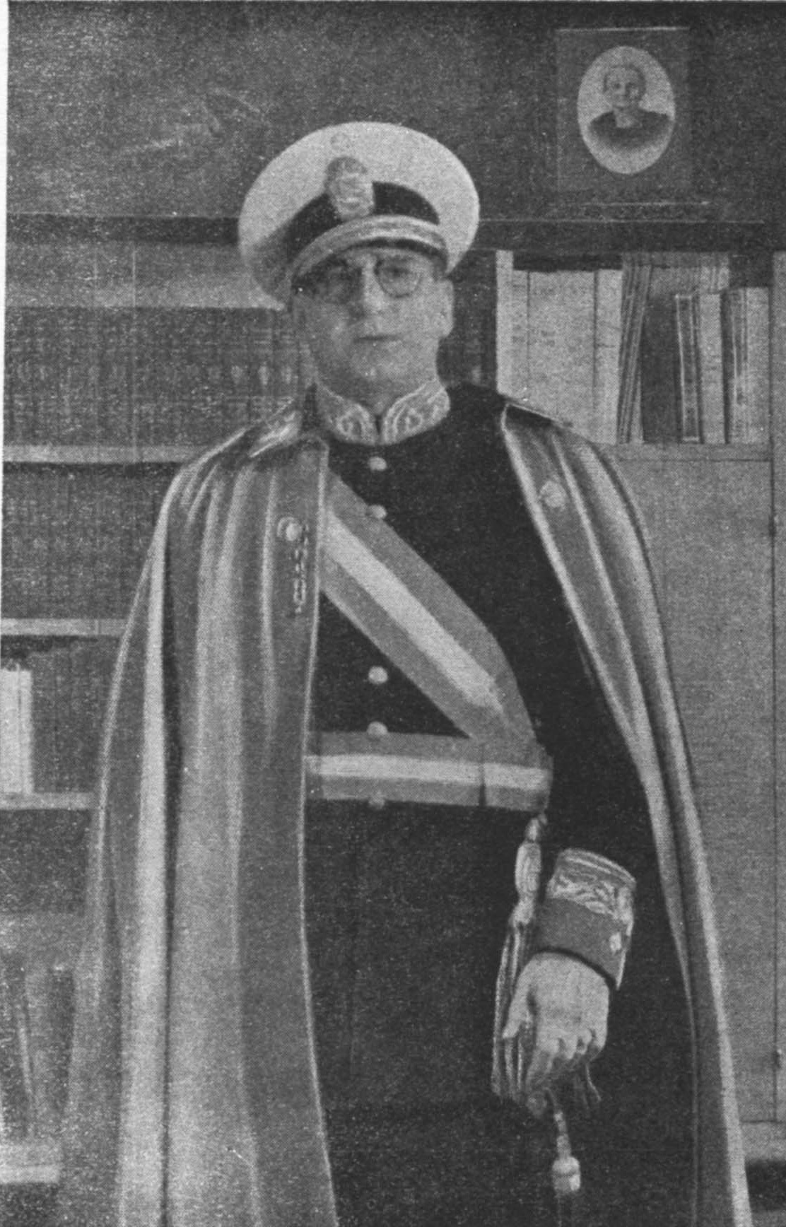 General Argentino. Primer gobernador de la Zona Militar de Comodoro Rivadavia entre 1944 y 1945, que abarcó el sur de la actual provincia del Chubut y el norte de la provincia de Santa Cruz.